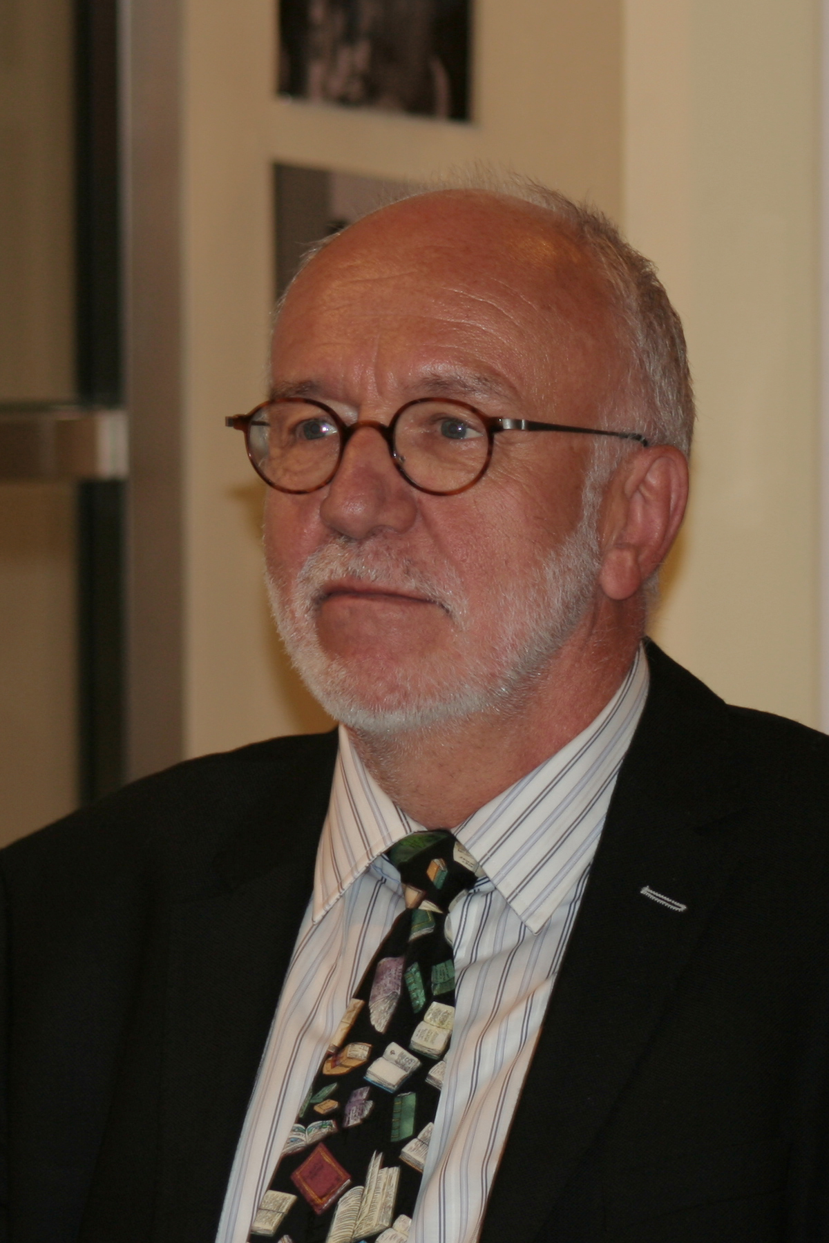 Der Wissenschaftshistoriker Ernst Peter Fischer bei einer Lesung